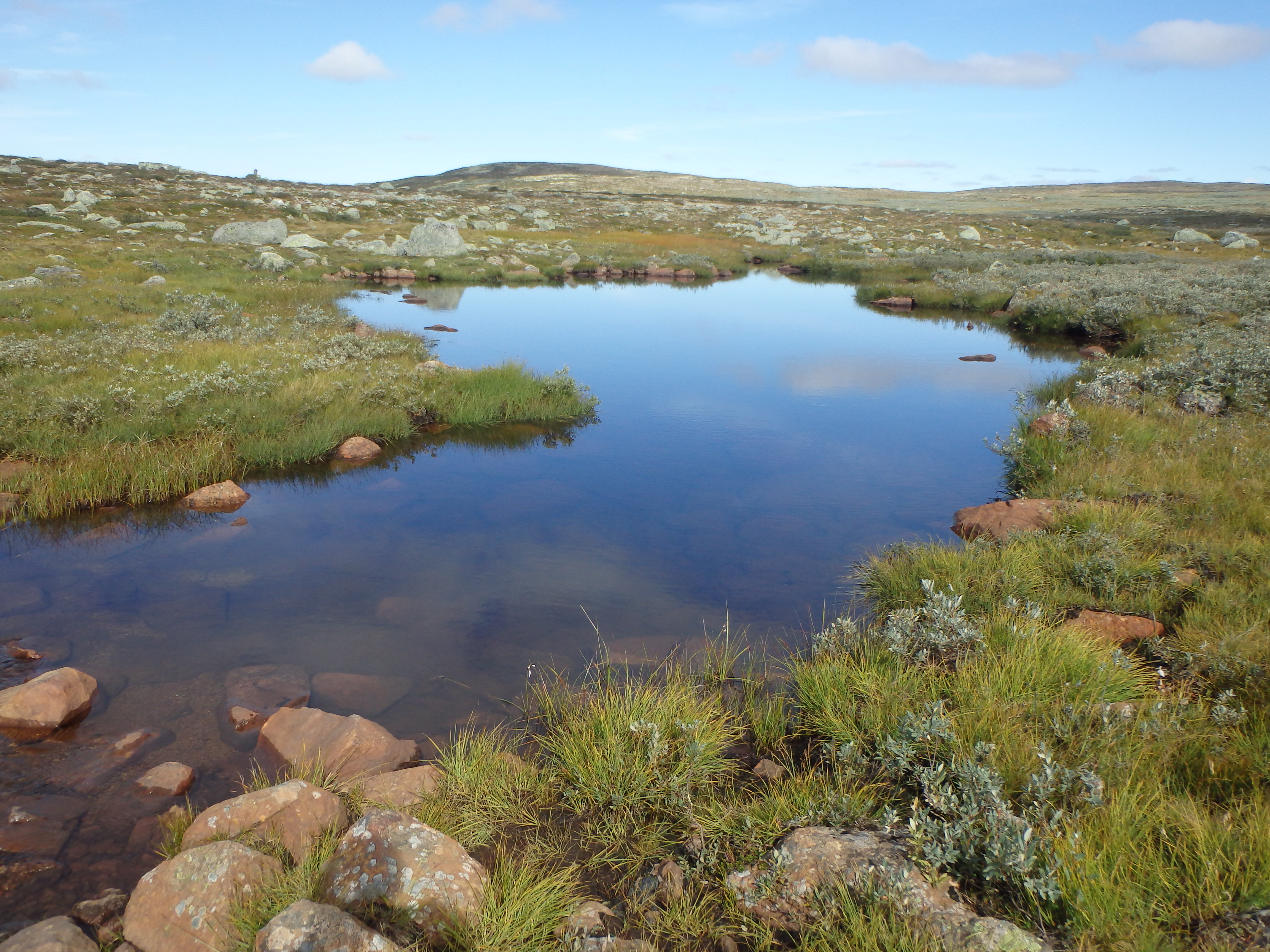 Hardangervidda